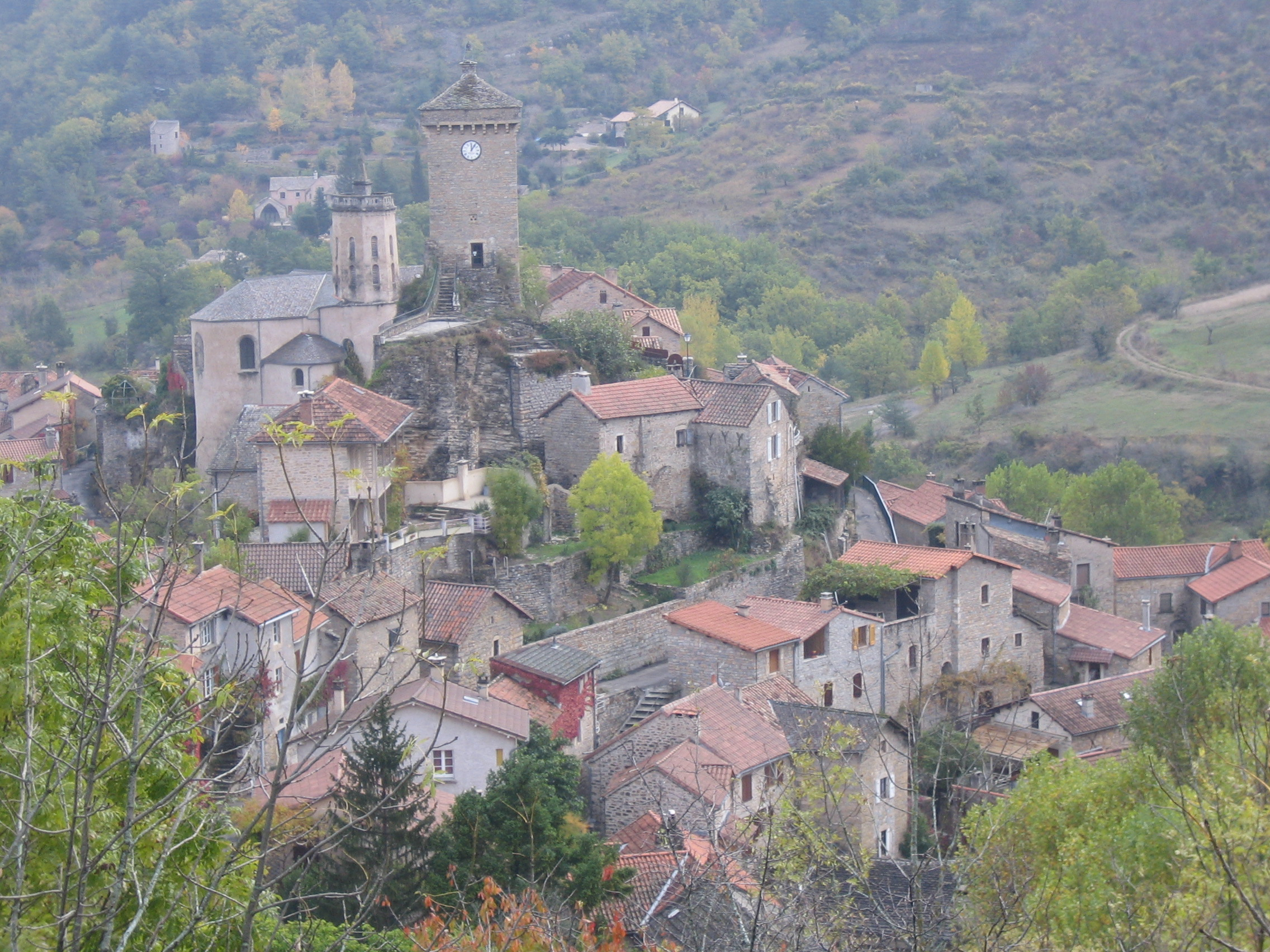 vue générale du village